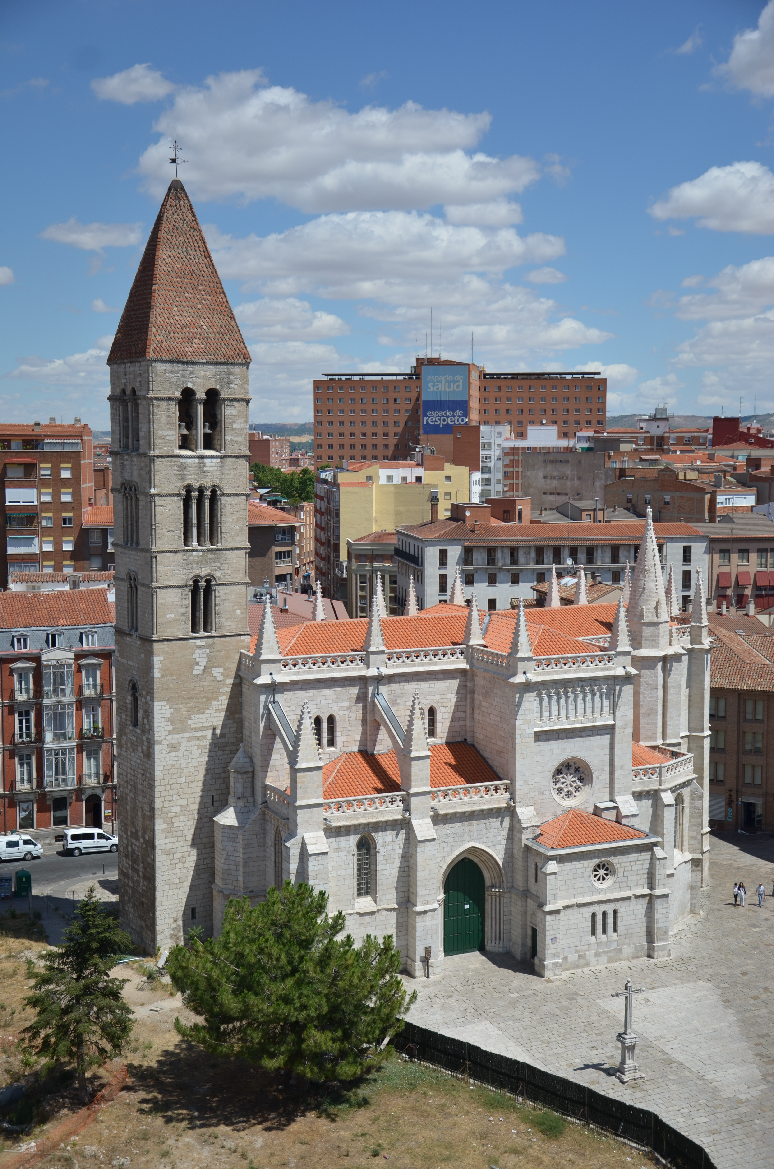 Iglesia La Antigua en la ciudad de Valladolid. Castilla y León. España